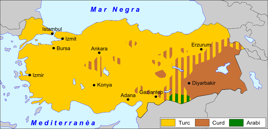 Lengas principalas de Turquia.